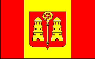 Vlag van Kalmthout